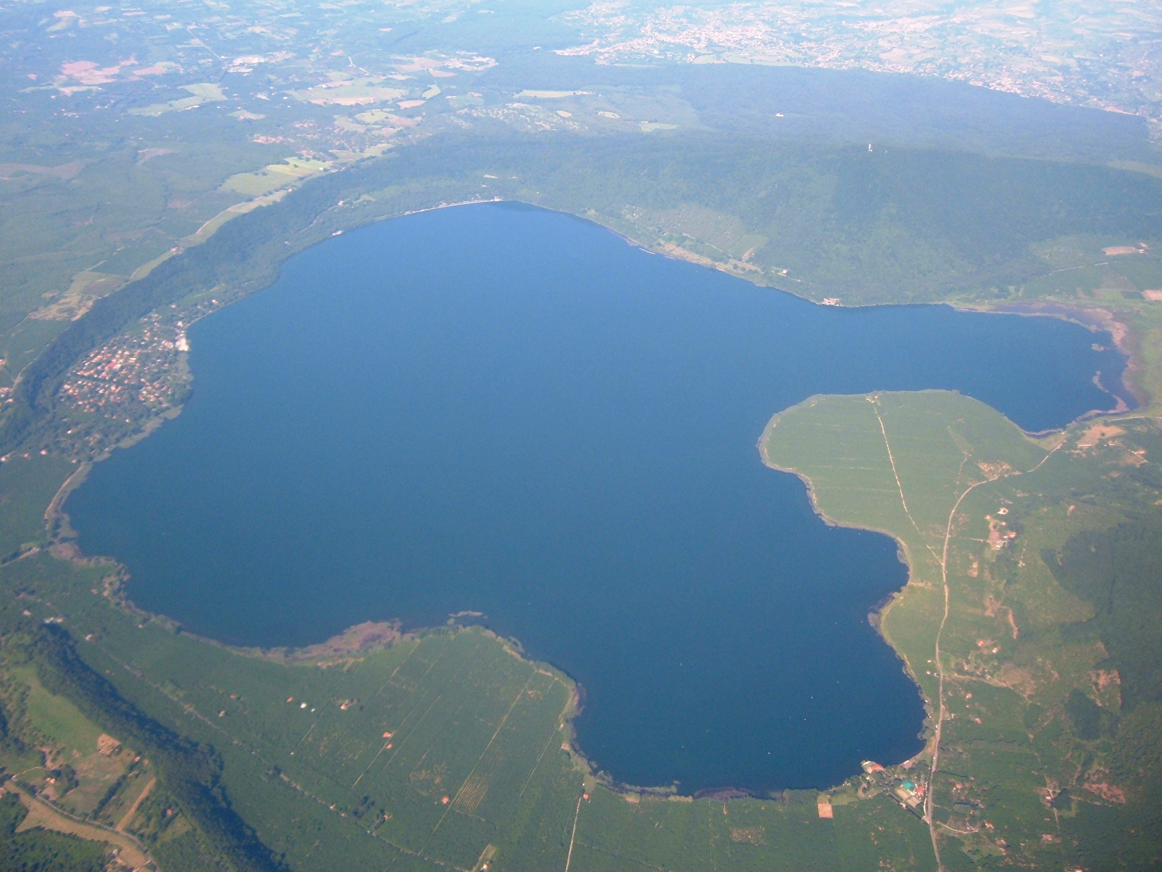 Vista aerea del Lago di Vico.